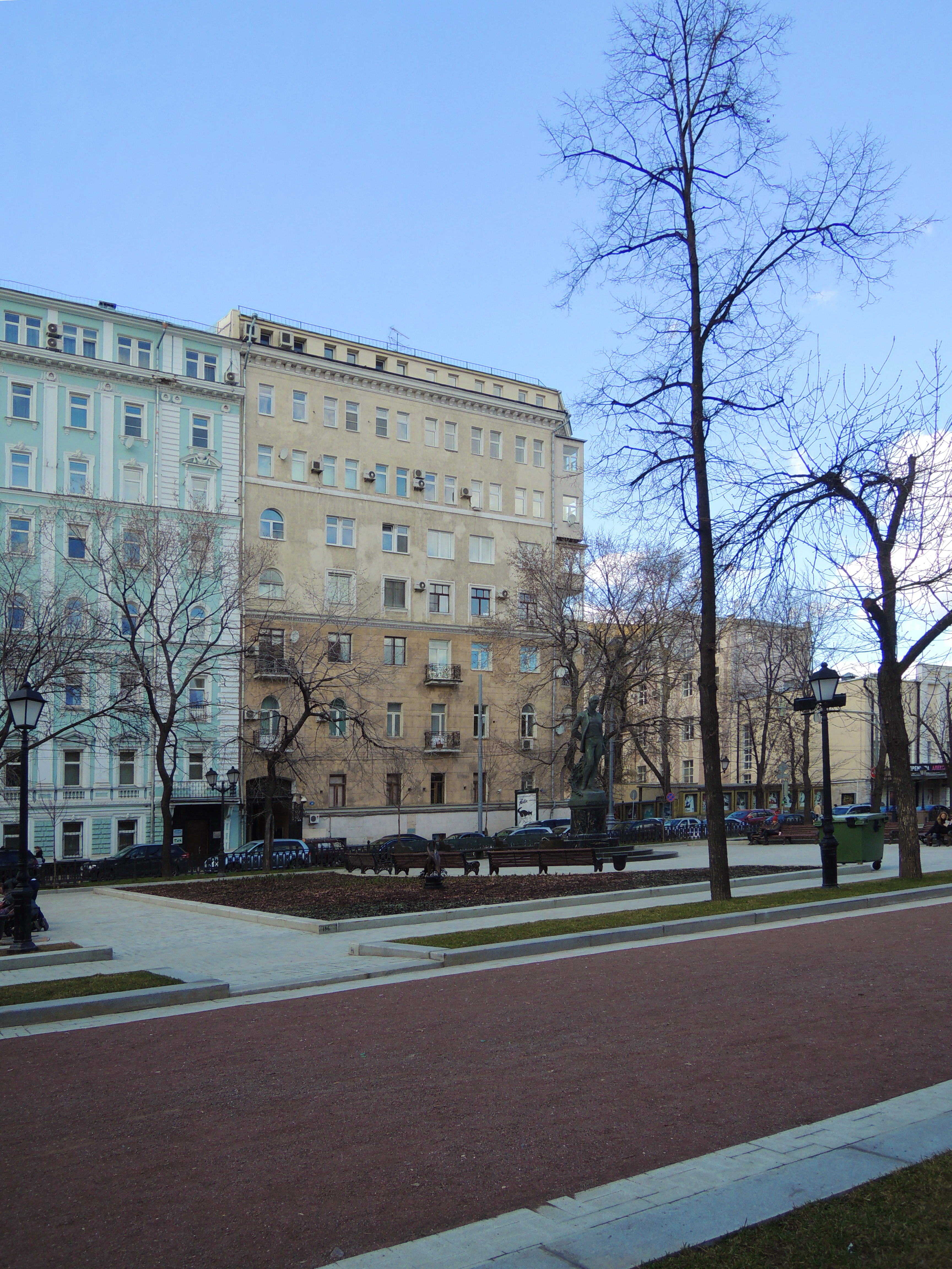 Тверской бульвар. № 19